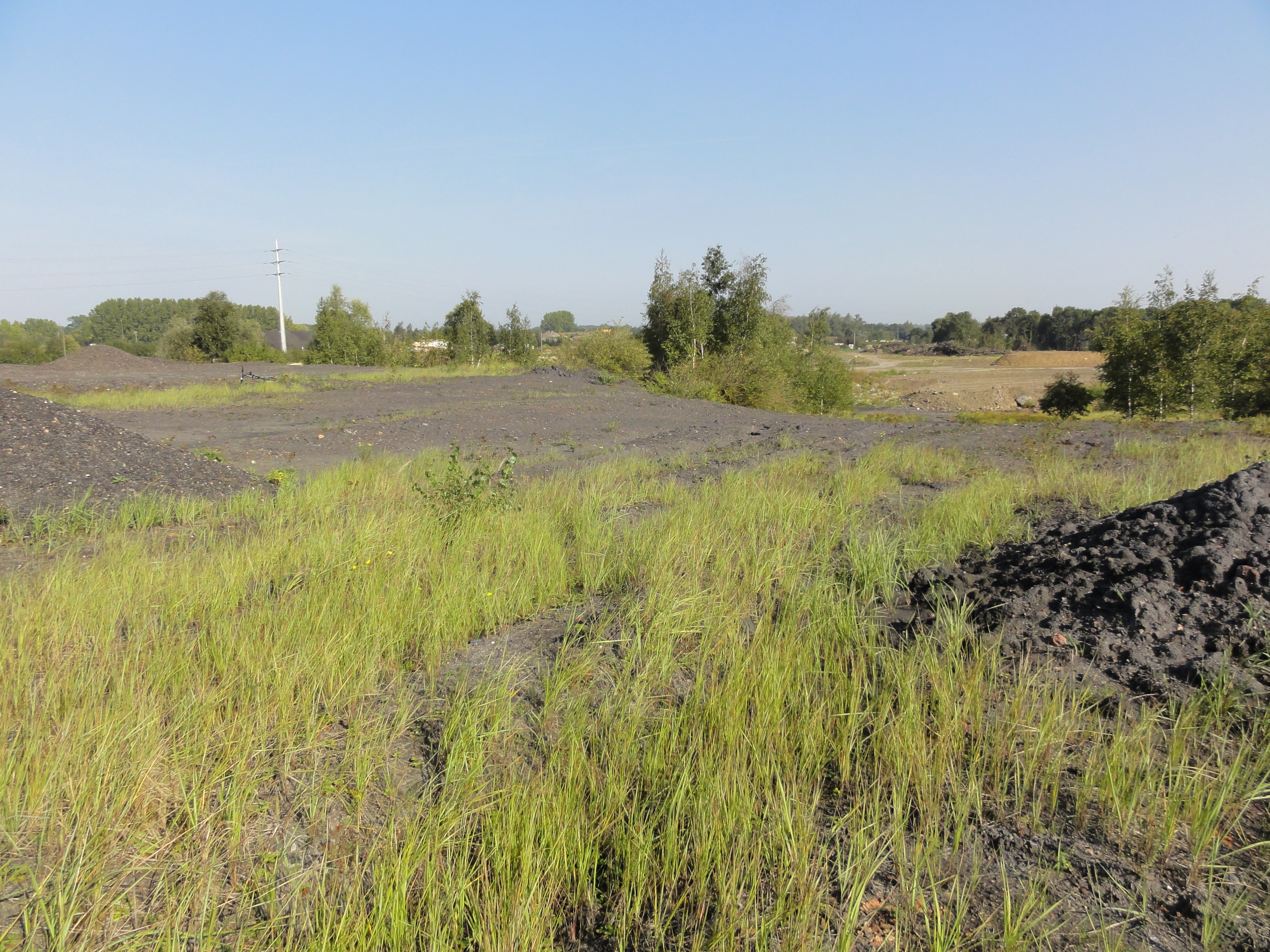 Terril n° 179 dit Thiers, Fosse Thiers de la Compagnie des mines d'Anzin, Saint-Saulve, Nord, Nord-Pas-de-Calais, France.